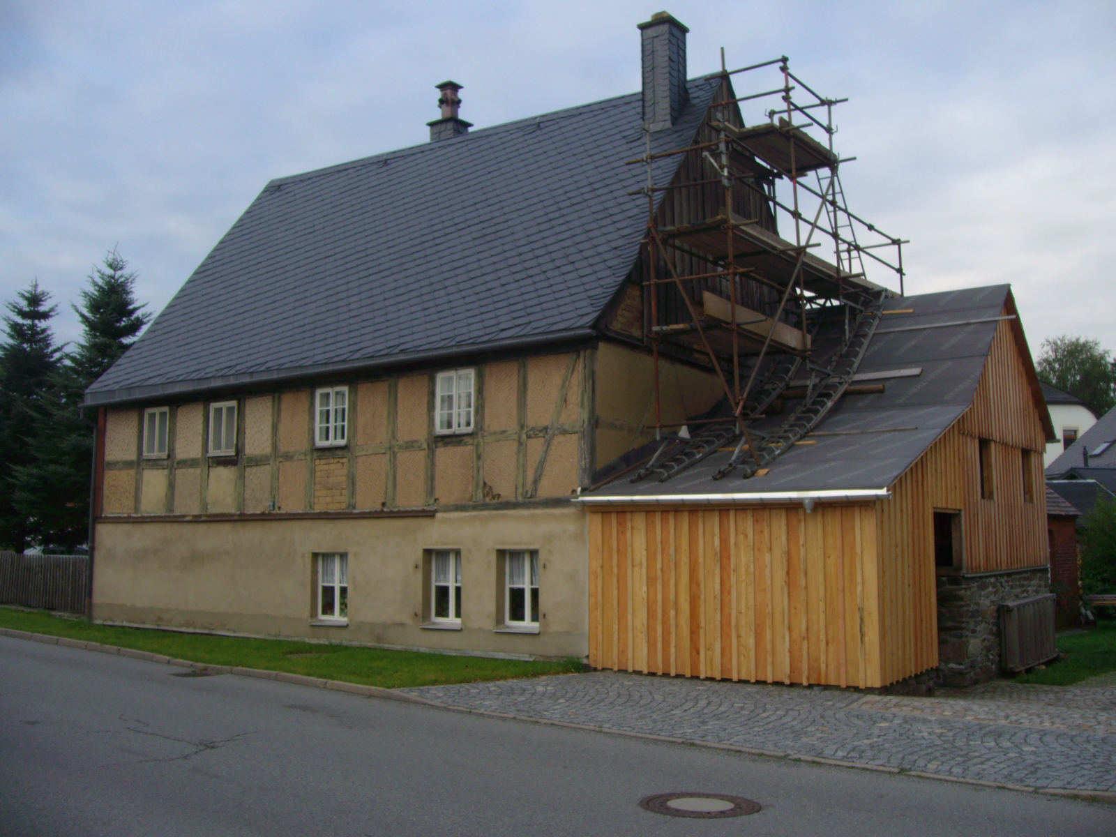 Eigentlich ist es nichts Besonderes, nämlich ein Wohn-/Stallhaus in erzgebirgstypischer Fachwerkbauweise. Standort: Karlsbader Straße 25 in Sehma. Erbaut 1768. Das Fachwerk im 1. OG ist komplett erhalten. Denkmal seit 1997. Ebenso lange läuft auch bereits die Restaurierung. Grund der Aufnahme: Dokumentation der Sanierung des Nordgiebels. Das Haus ist seit 2001 wieder bewohnt (vom Fotografen/Eigentümer). In fertigen Häusern kann ja schließlich jeder wohnen.....